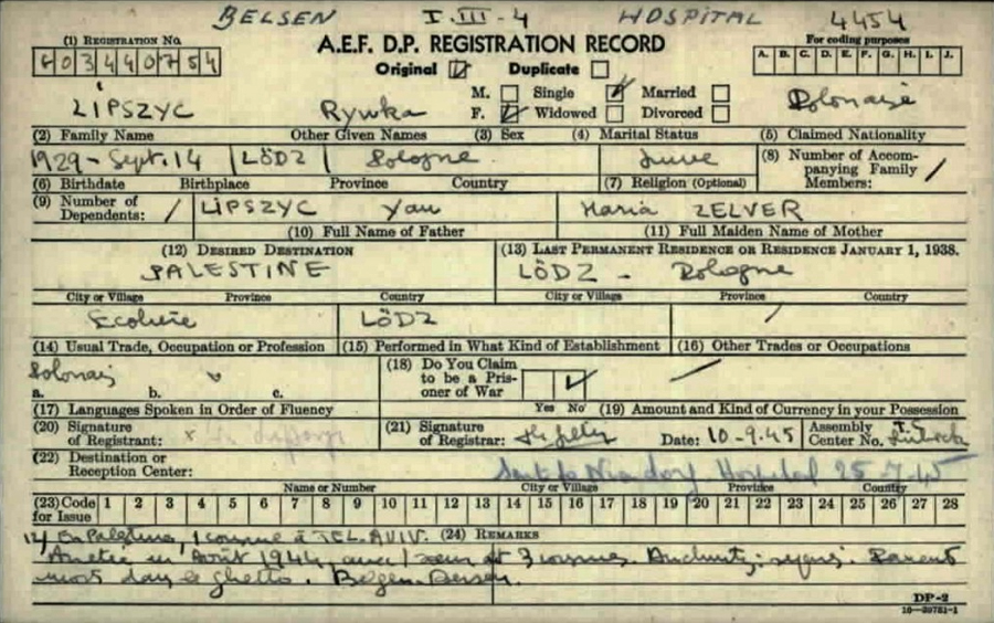 Registration record établi au camp pour personnes déplacées de Bergen-Belsen le 10 septembre 1945. Ce formulaire est le dernier connu concernant Rywka Lipschitz.